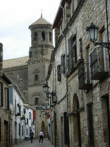 Calles de Baeza Calle Conde Romanones de Baeza, por Juampa Mola